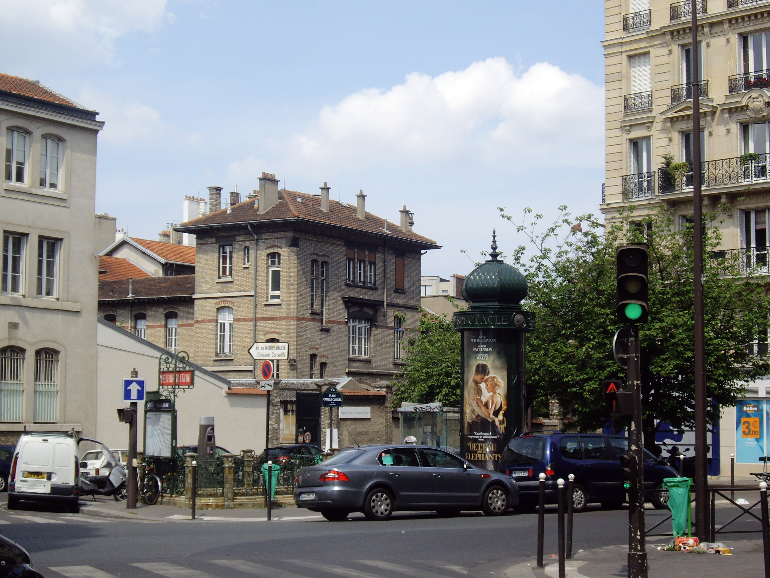 Place Camille-Claudel, Paris 15e. Vue depuis la rue de Vaugirard à l'entrée de la rue Falguière. Au centre, la station de métro Falguière. À l'arrière-plan, une des entrées de l'hôpital Necker-Enfants malades, donnant sur la rue du Cherche-Midi.